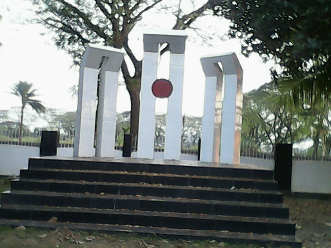 মংলা বন্দর মাধ্যমিক বিদ্যালয়